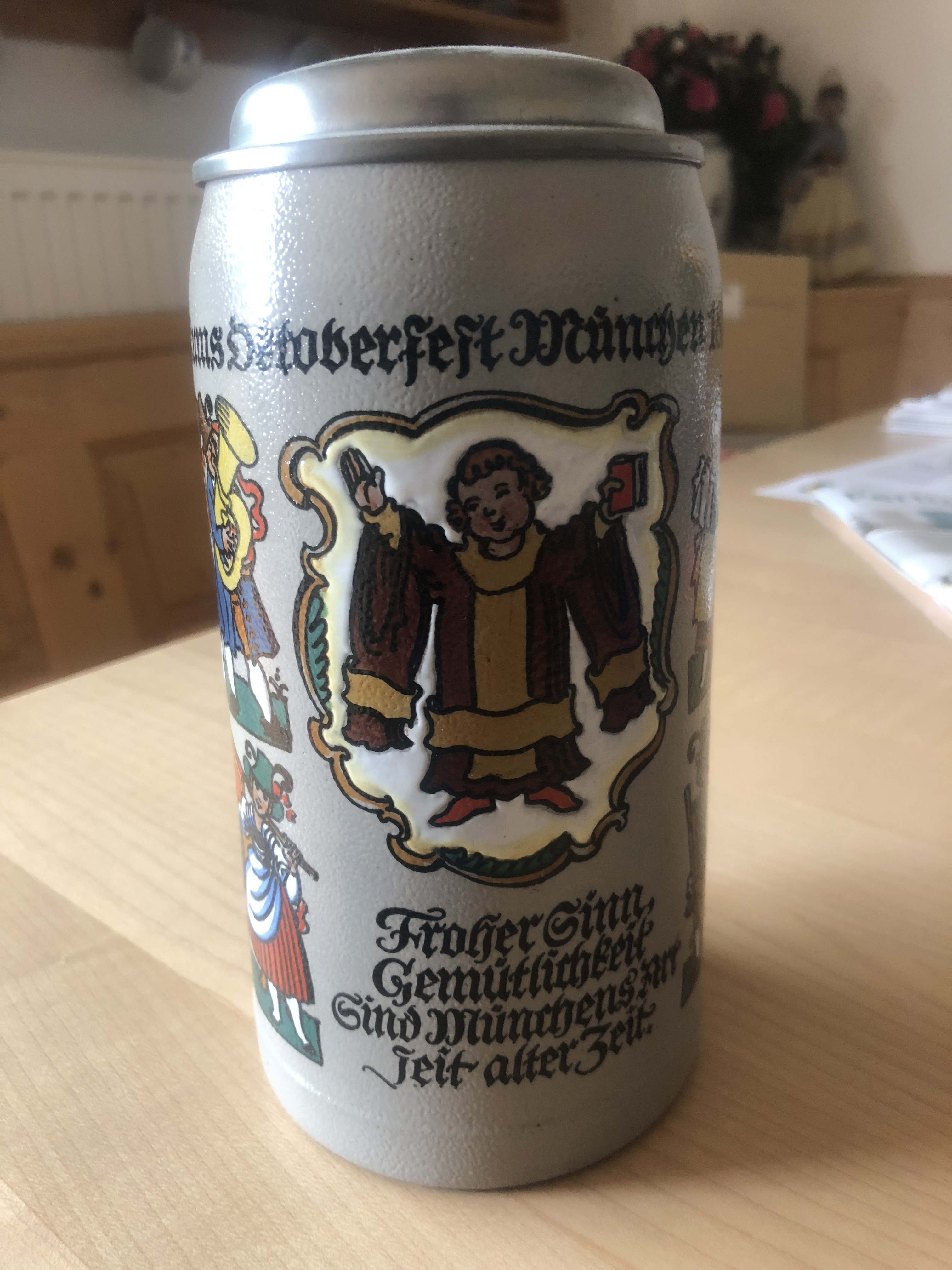 Jubiläums-Bierkrug des 125jährigen Oktoberfestes Entwurf von P.Neu Bemahlt durch Arbeitsgemeinschaft der Münchner Glas- und Porzellanmaler